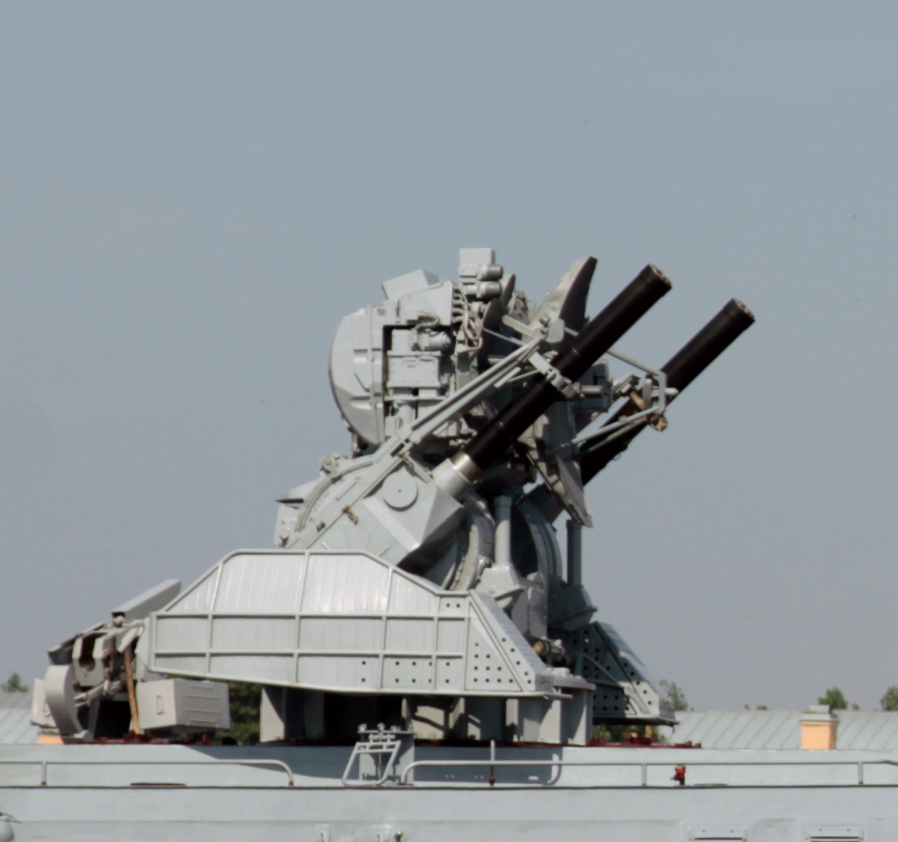 Кортик "Каштан" на корвете "Стерегущий"